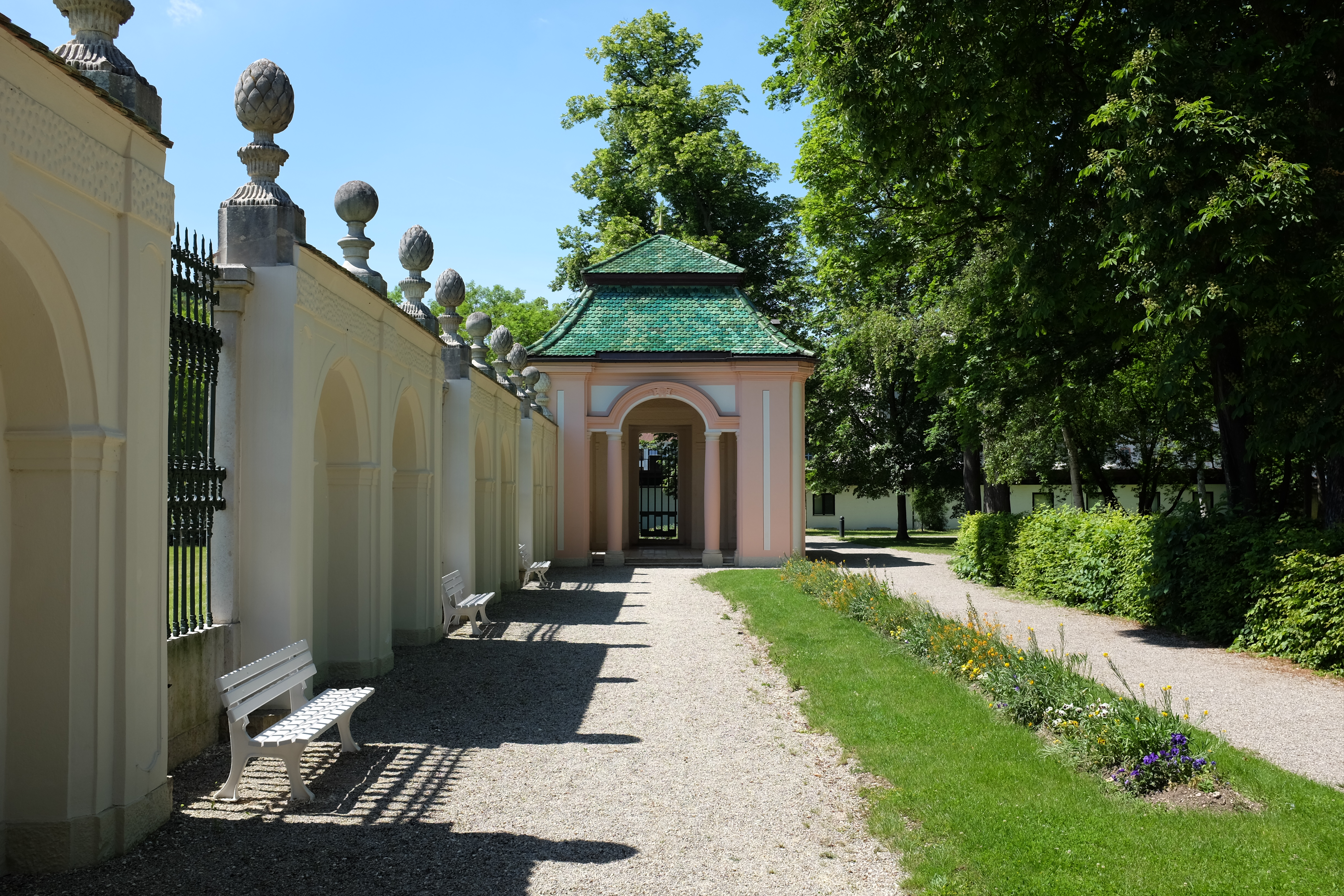 Pavillon im Hofgarten